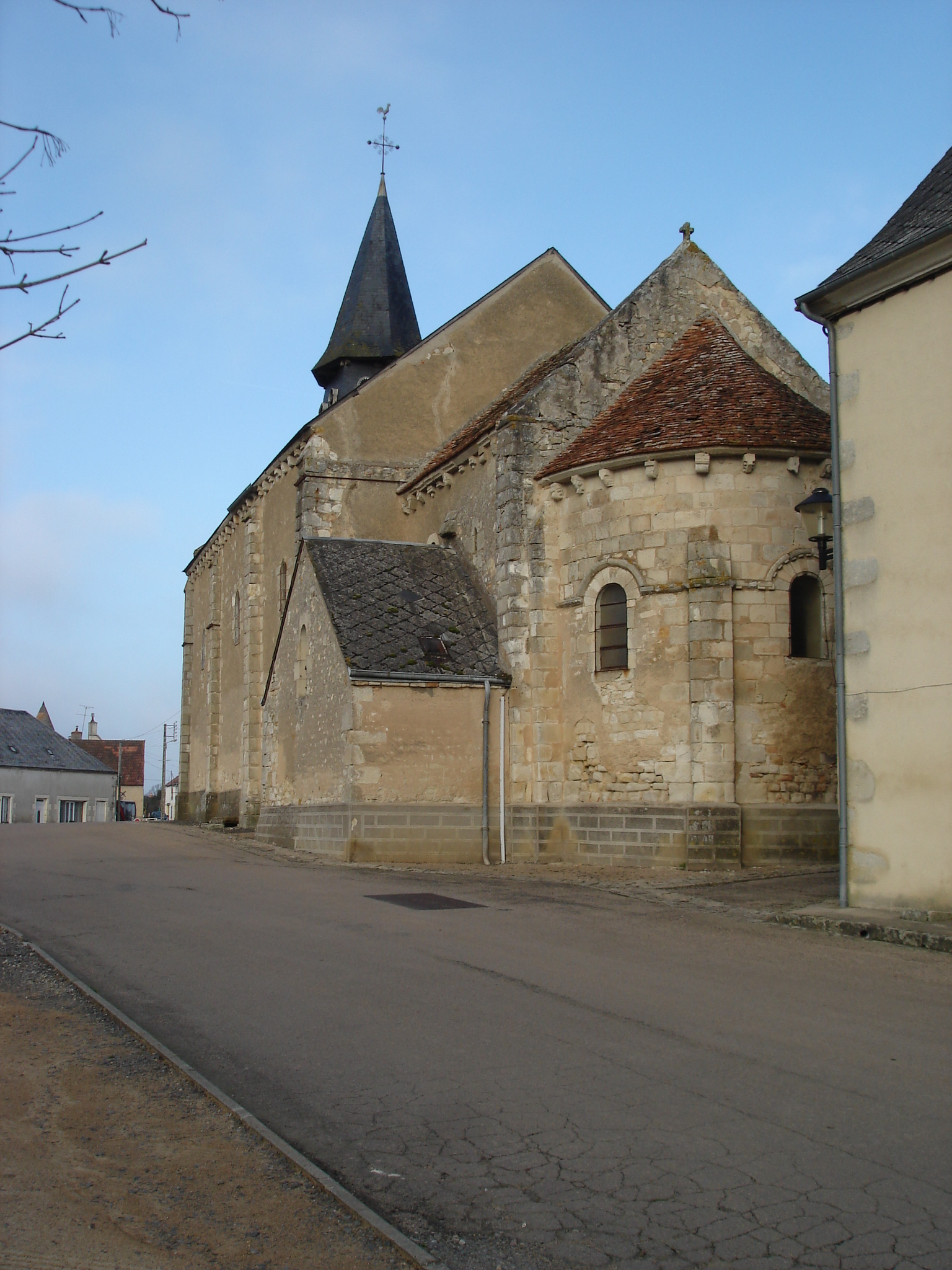 Vicq-Exemplet (36) : L'église Saint-Martin.